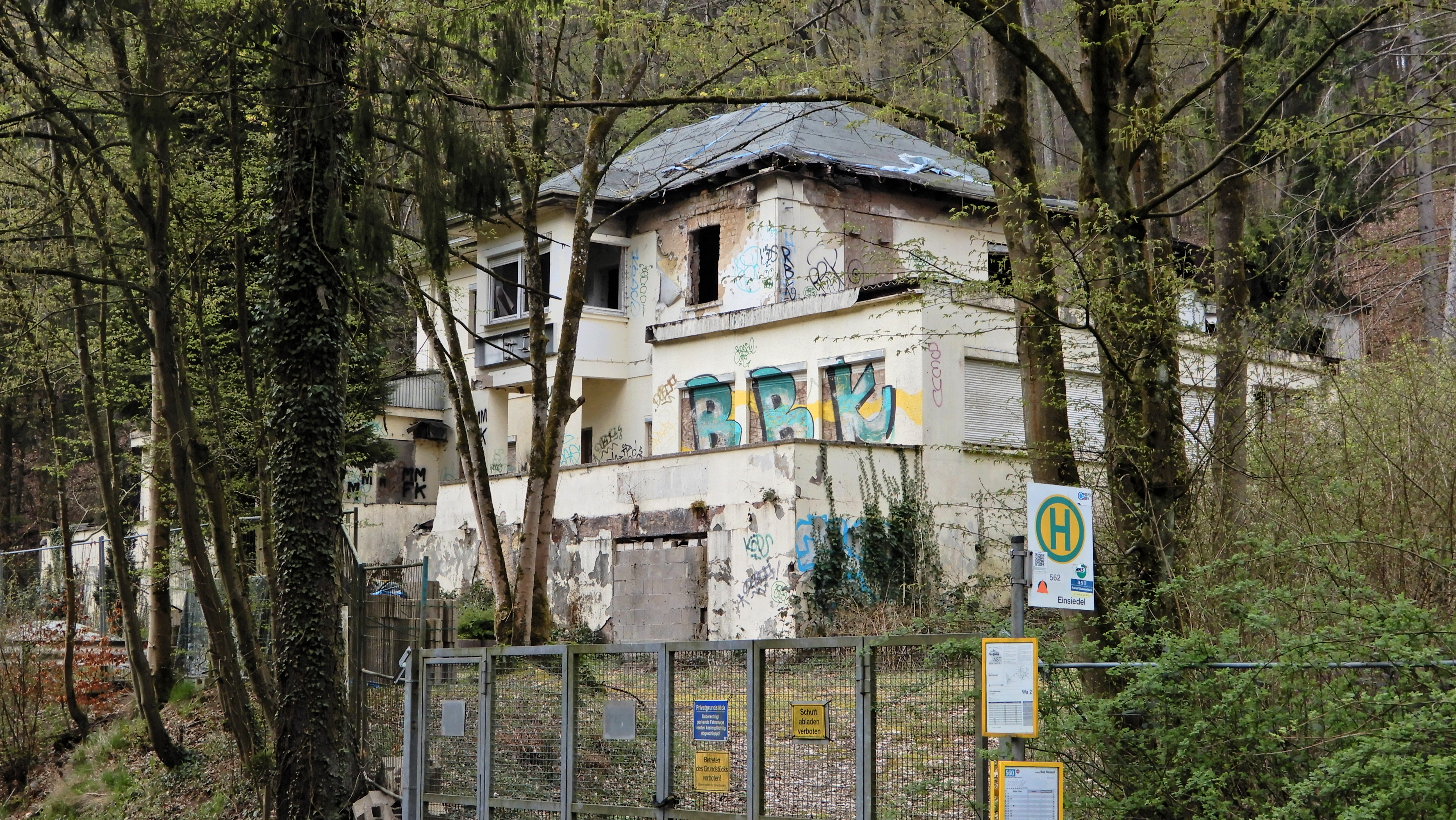 Haus Einsiedel im Schmelztal, Schmelztalstraße 51, Bad Honnef